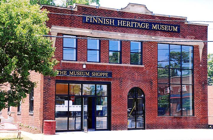 Finnish Heritage Museum New Building